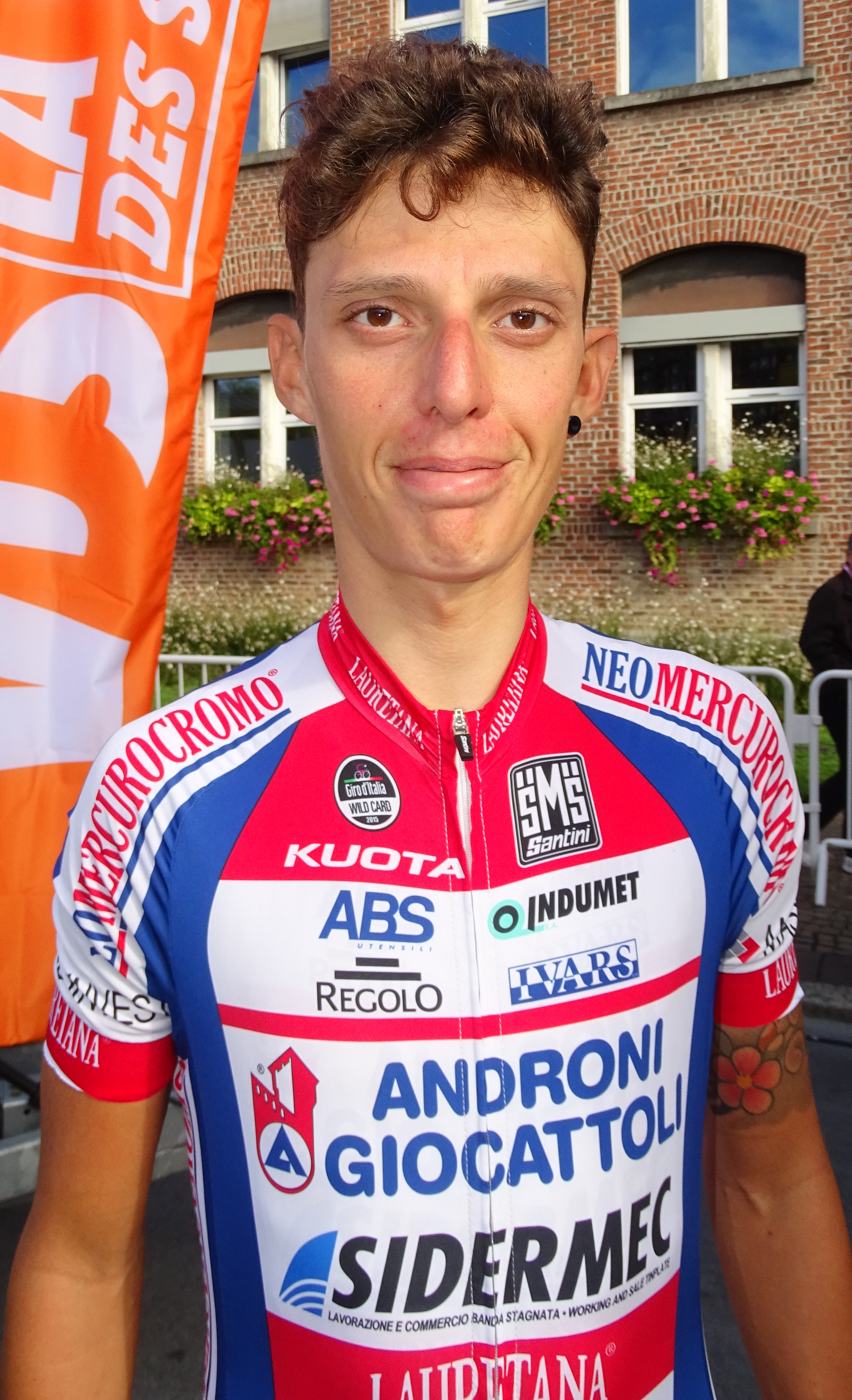 Reportage réalisé le dimanche 6 septembre à l'occasion du départ et de l'arrivée du Grand Prix de Fourmies 2015 à Fourmies, Nord-Pas-de-Calais, France.